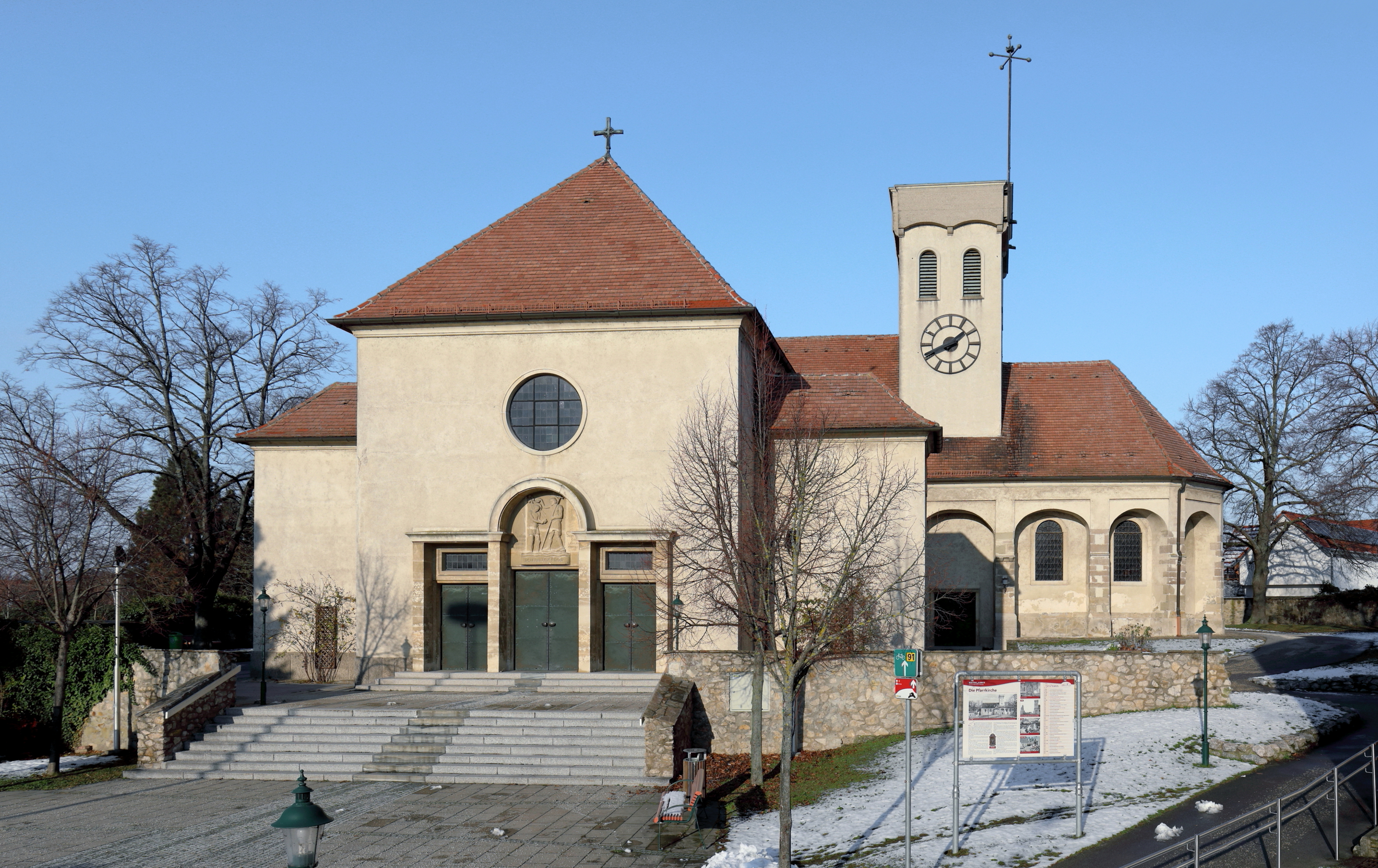 Die röm.-kath. Pfarrkirche hl. Johannes der Täufer in der niederösterreichischen Stadt Deutsch-Wagram.Ab Mai 1956 wurde linksseitig des romanischen Chorquadratturmes die alte Pfarrkirche bzw. dessen Langhaus abgerissen und rechtwinkelig dazu die neue Pfarrkirche nach einem Entwurf des Architekten Hans Petermair angebaut und am 21. Juni 1958 geweiht. Das Relief über dem dreiteiligen Hauptportal stellt den hl. Johannes der Täufer dar und ist ein Werk des Bildhauers Rudolf Schmidt.